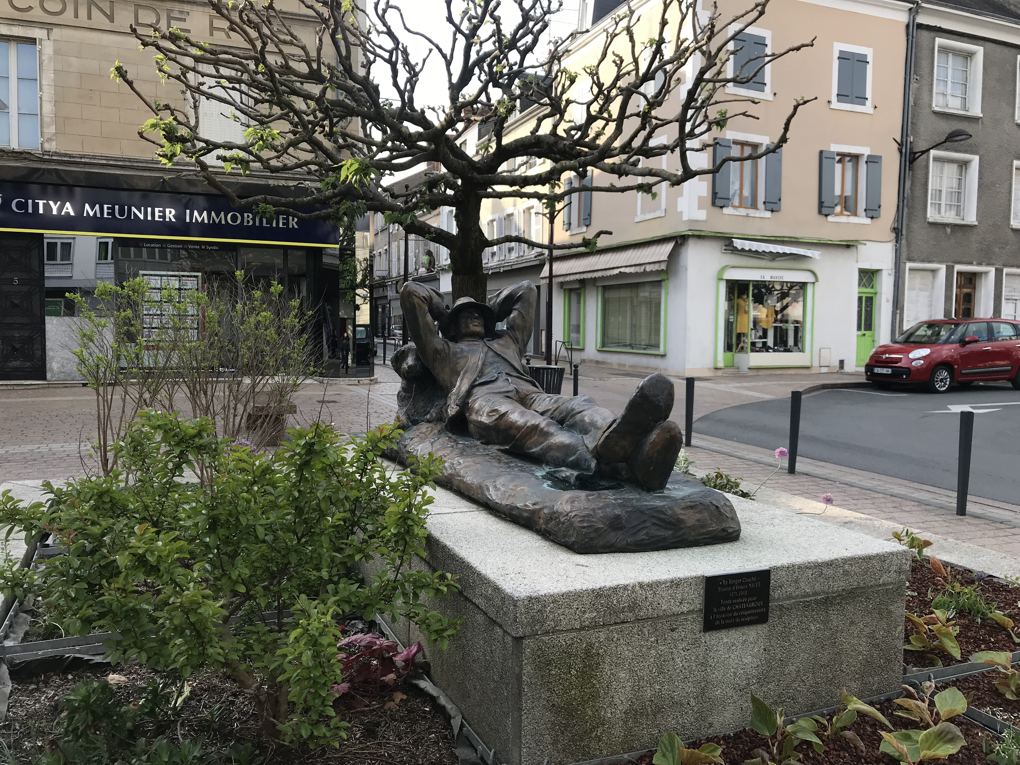 法国城市沙托鲁的街头雕塑